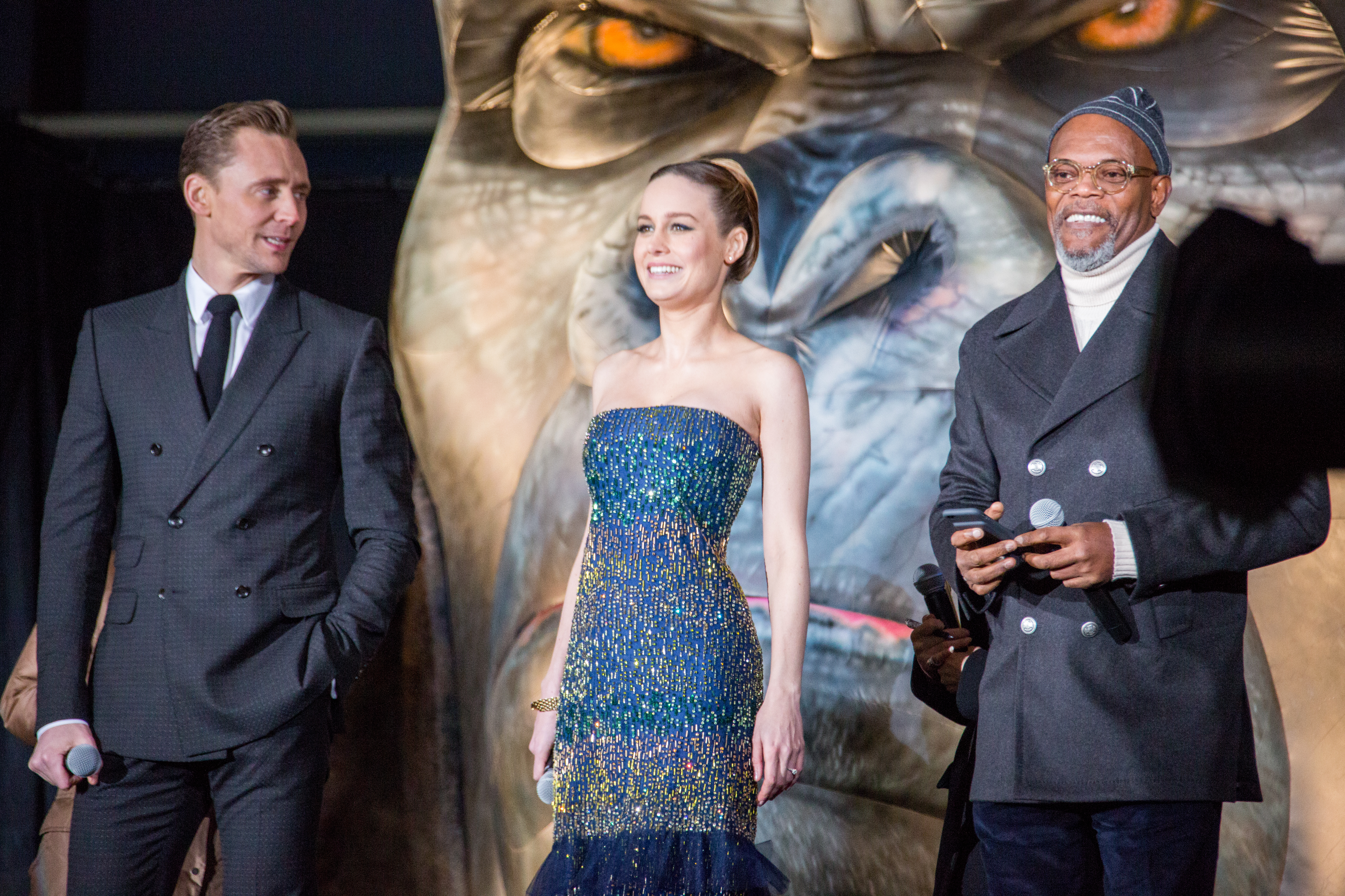 キングコング: 髑髏島の巨神 ジャパンプレミア レッドカーペット トム・ヒドルストン ブリー・ラーソン サミュエル・L・ジャクソン